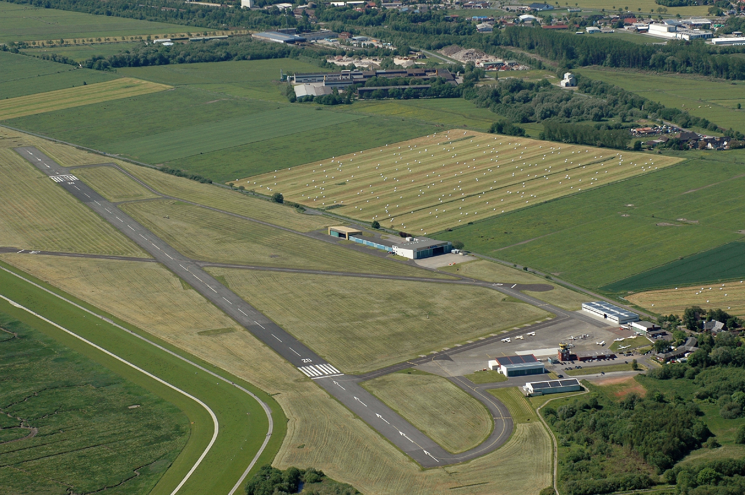 Der JadeWeserAirport, ehemals Flugplatz Mariensiel, bei Wilhelmshaven. Das Foto enstand auf einem Fotoflug vom Flugplatz Nordholz-Spieka über Cuxhaven und Wilhelmshaven.